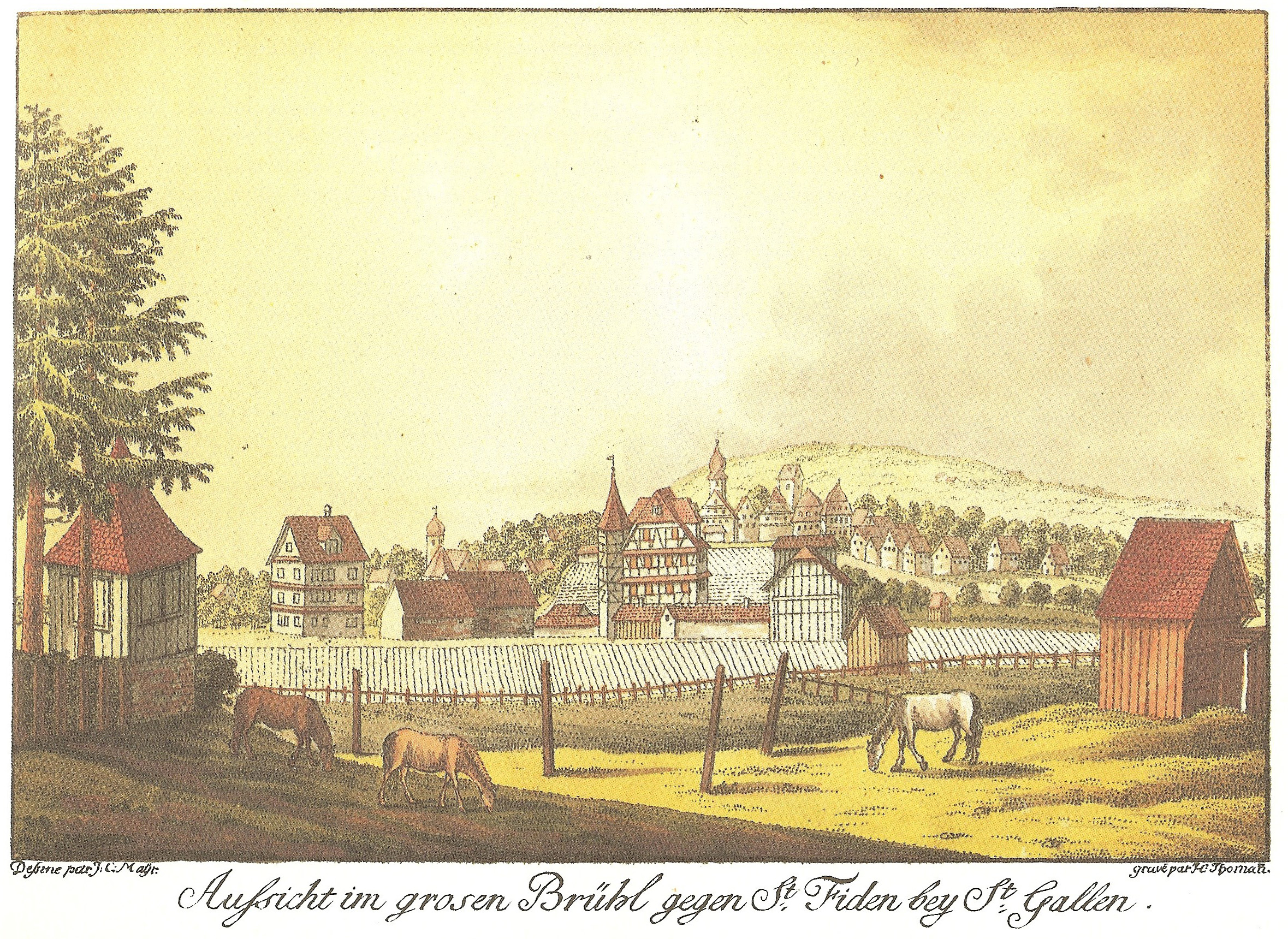 Aussicht im grosen Brühl gegen St. Fiden bey St. Gallen (Originaltitel).